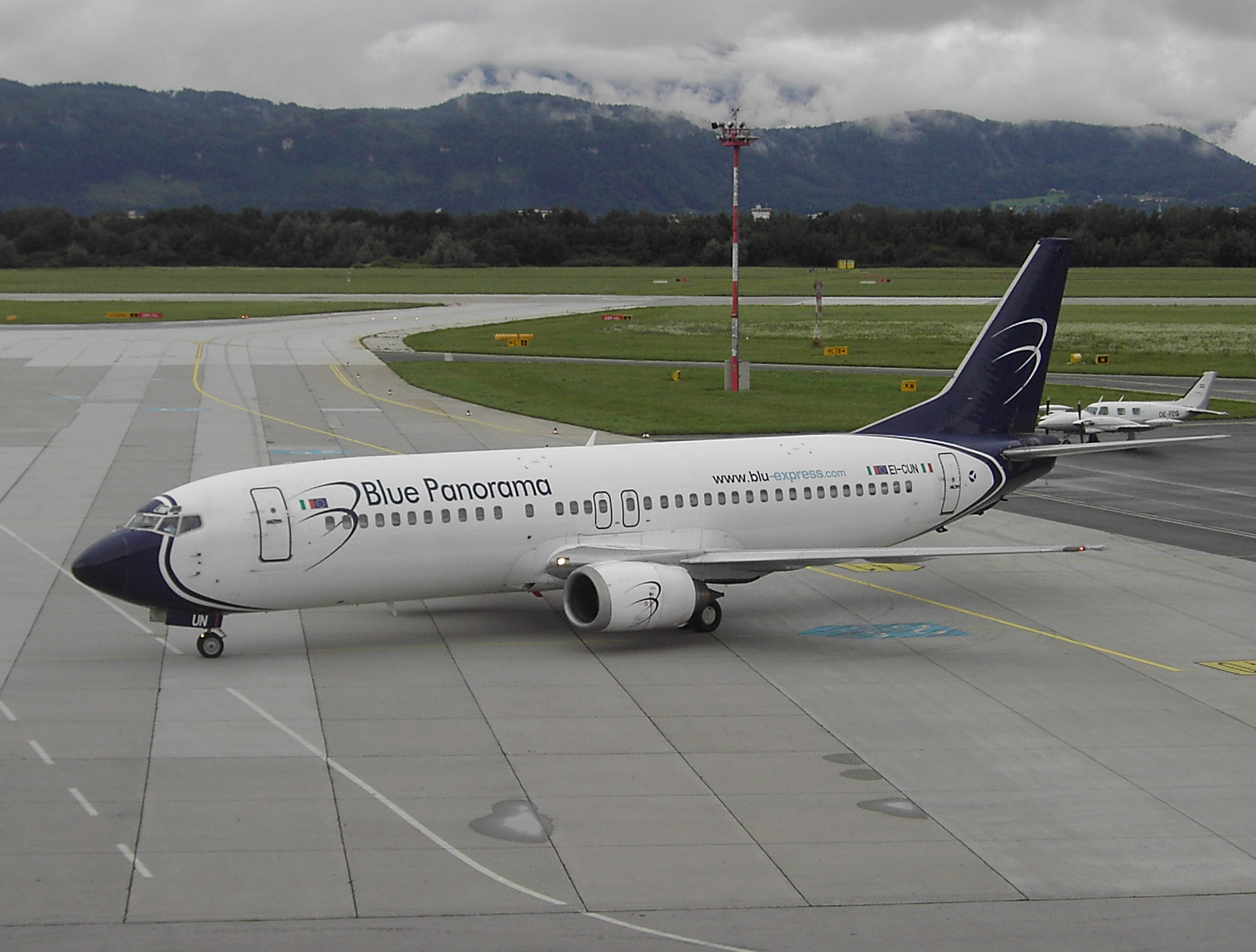 Eine Boeing 737-400 am Klagenfurter Flughafen